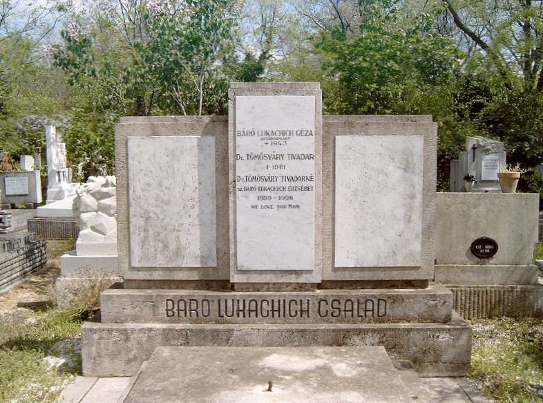 Lukachich Géza, báró (Kassa, 1865. márc. 29. – Bp., 1943. dec. 25.): altábornagy és családjának sírja Budapesten. Új köztemető: 29/2-1-14K.